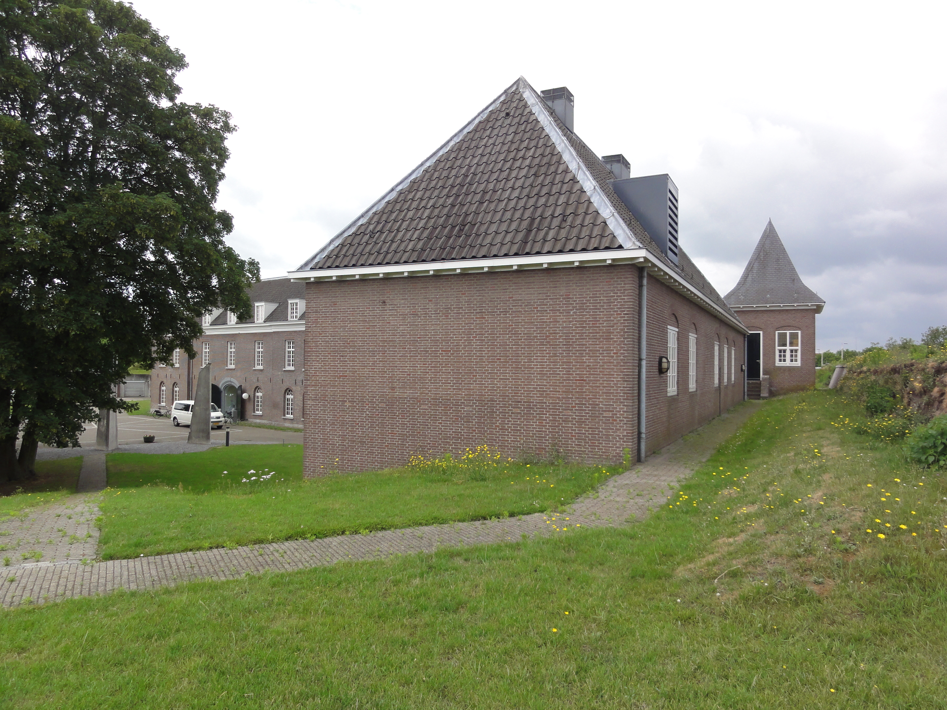 Citadel van 's-Hertogenbosch gebouw noordzijde